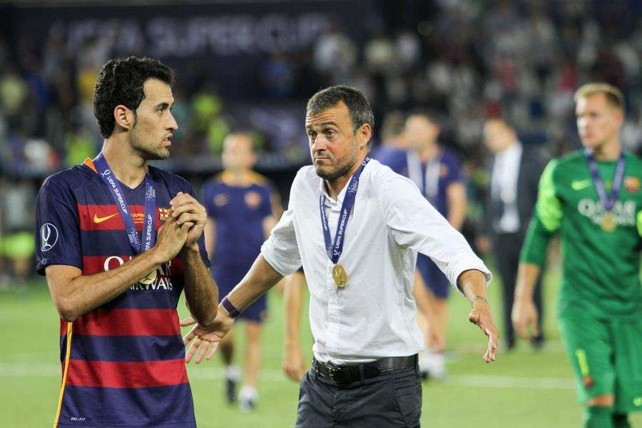 Нагородження переможців матчу за Суперкубок УЄФА 2015 року у Тбілісі. Грузія